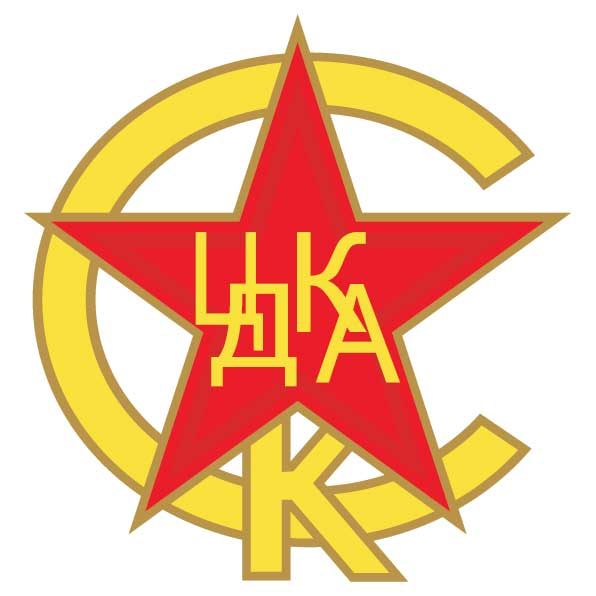 Эмблема ЦДКА (ПФК ЦСКА Москва) Эмблема футбольного клуба